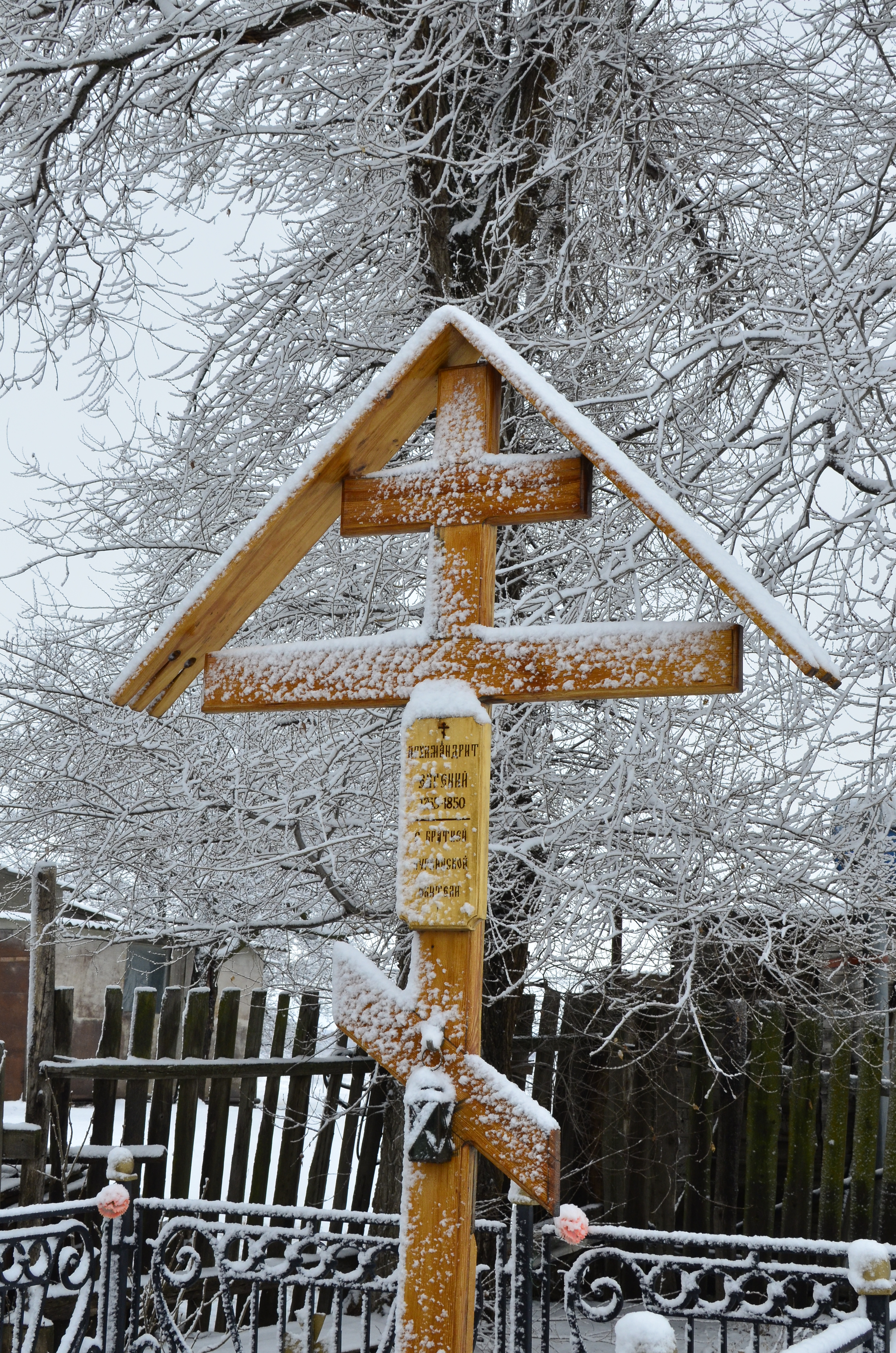 В Чуркинском монастыре